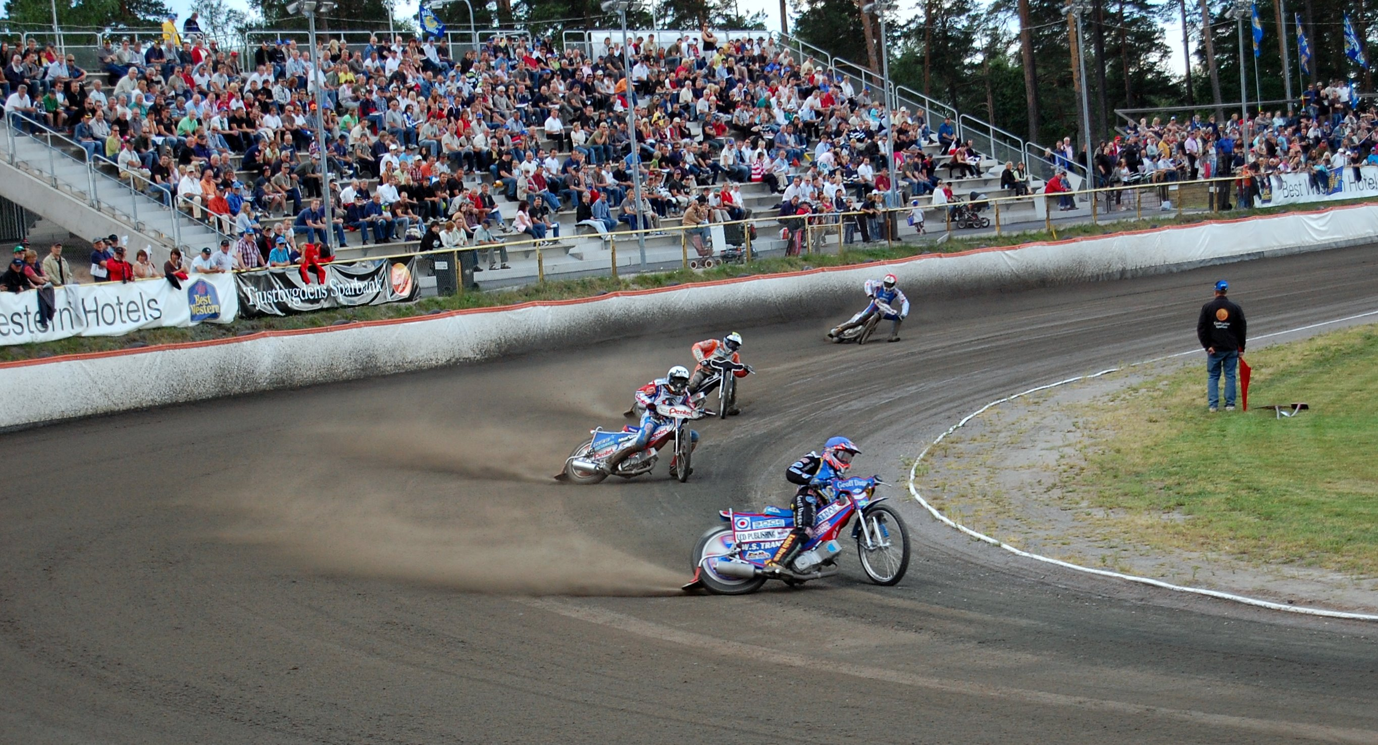 Speedway in Sweden. Västervik - Indianerna.